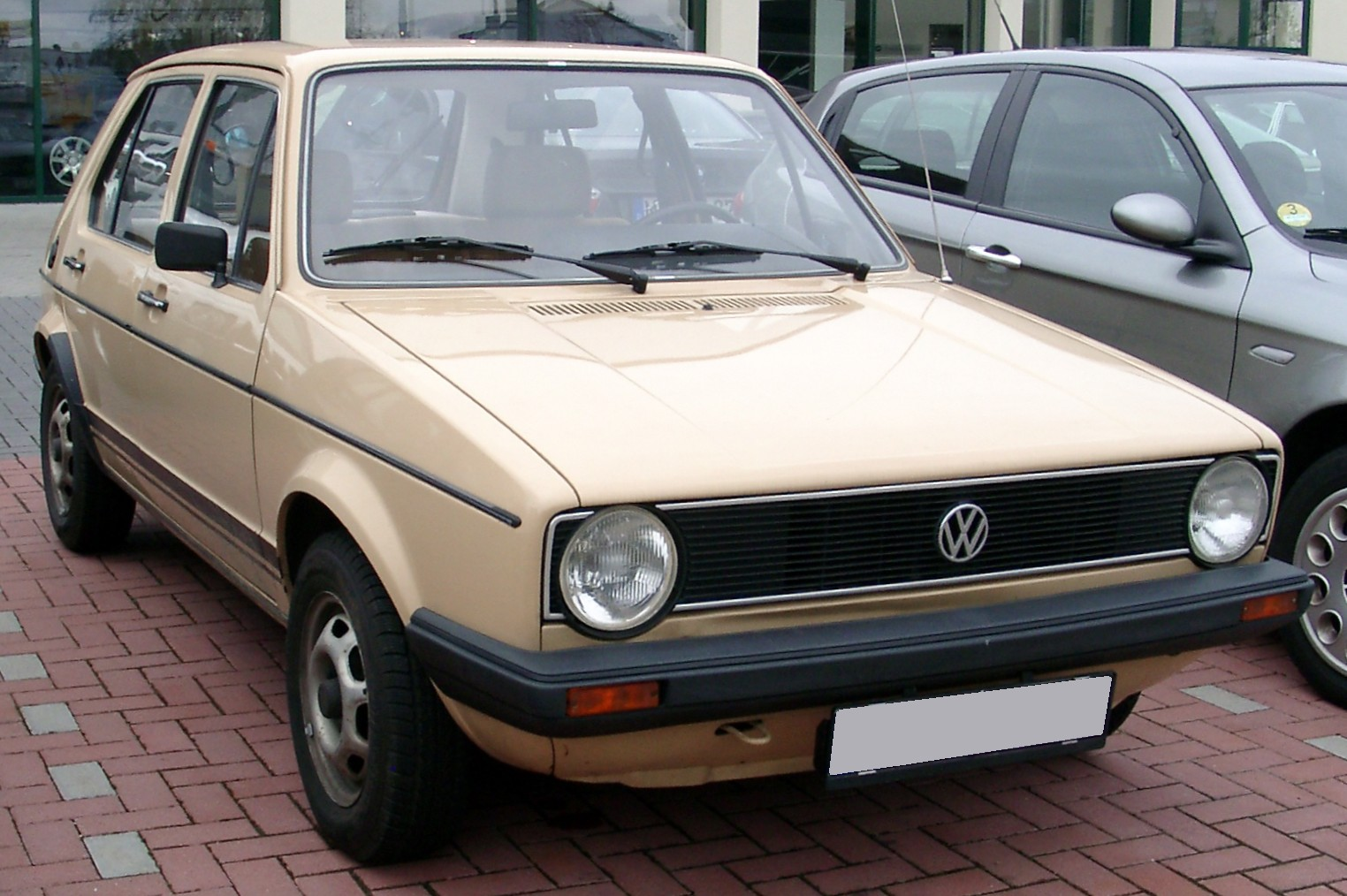 VW Golf I